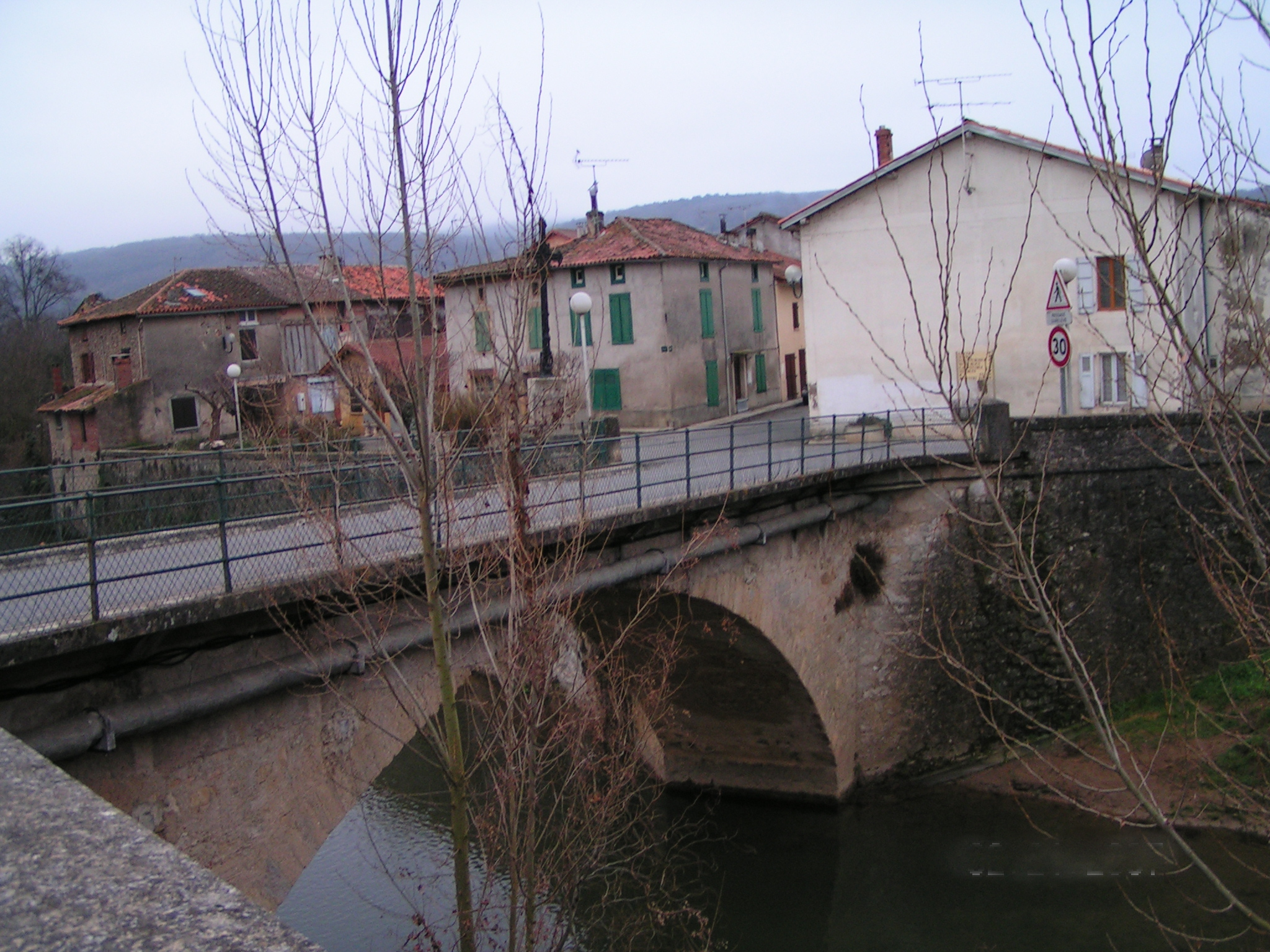 Campagne-sur-Arize (Ariège, France)